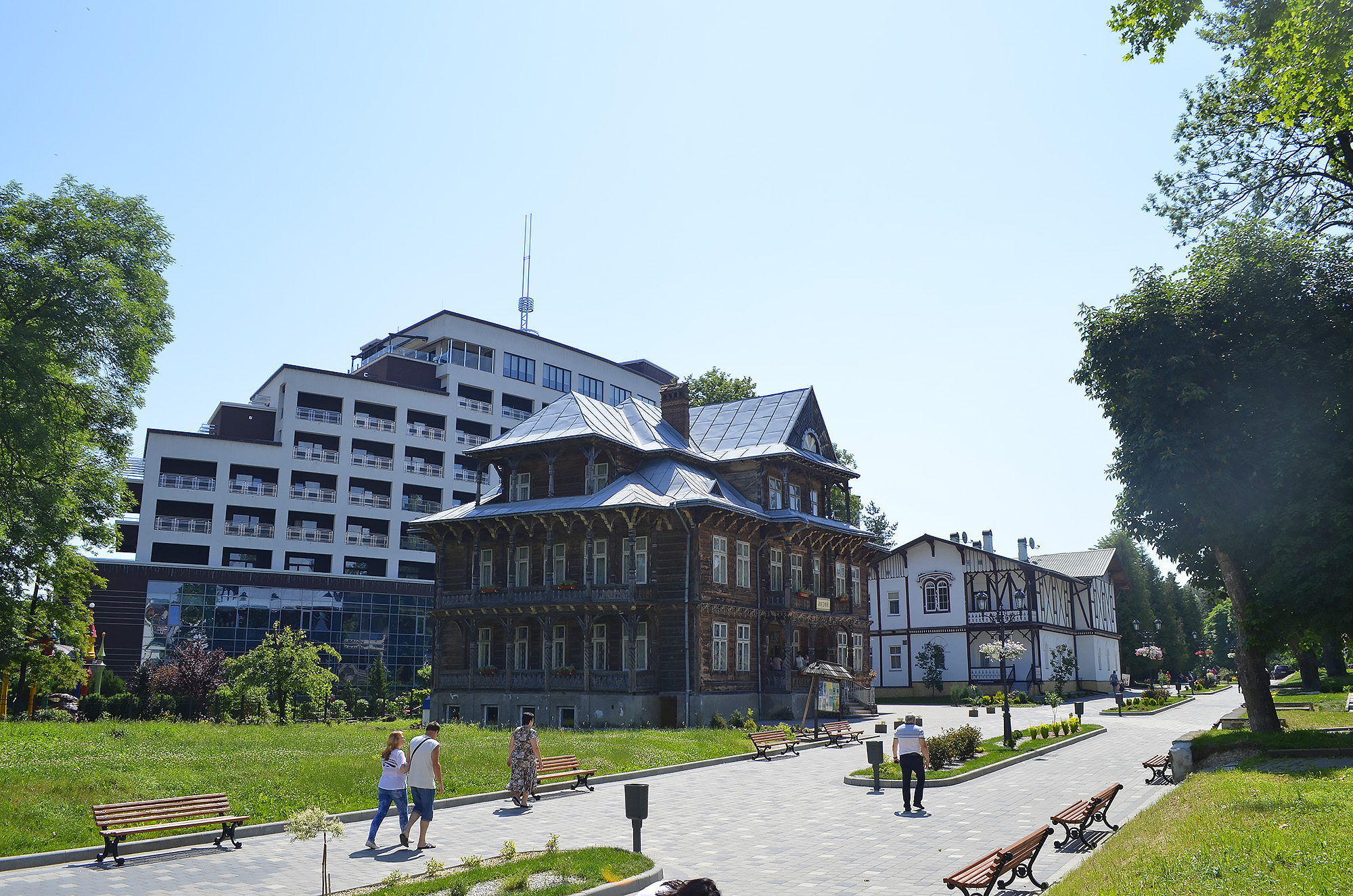 Сучасний піший проспект Степана Бандери. На фоні музей Біласа, Mirotel Resort SPA (санаторій)